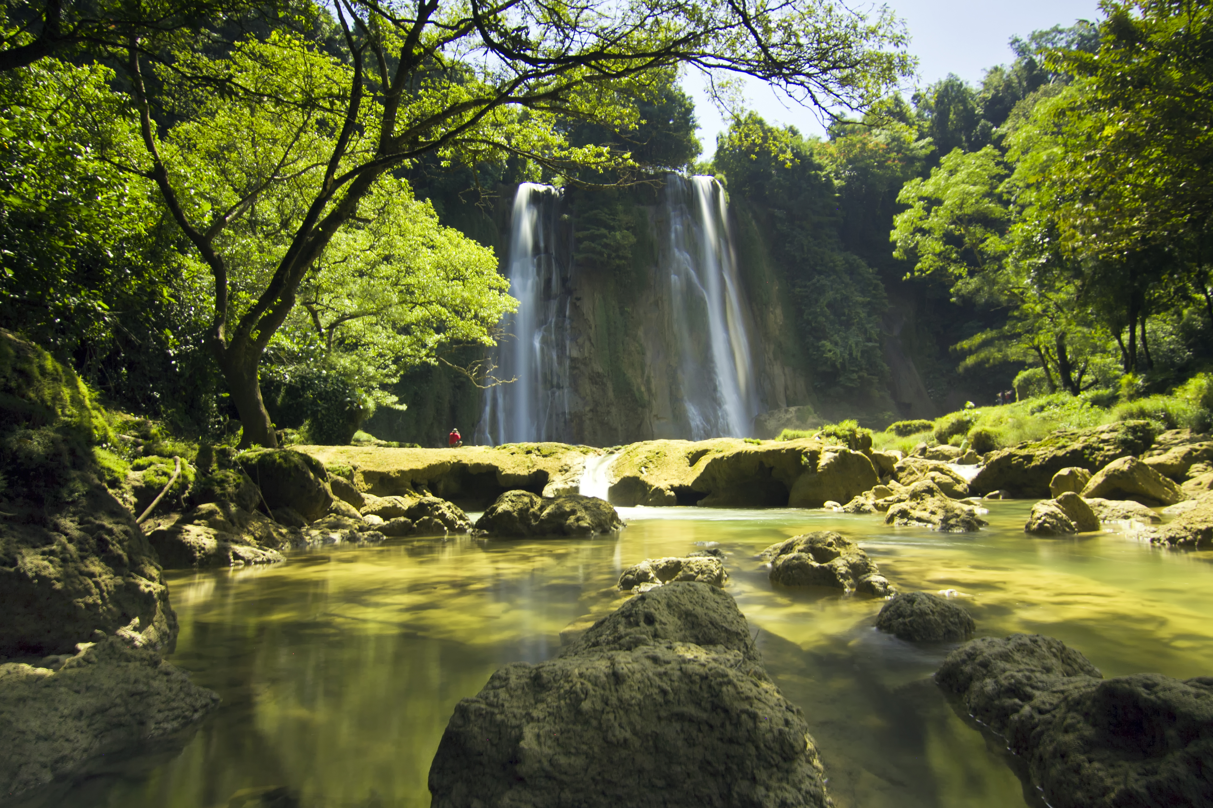 curug cikaso merupakan salah satu curug terindah yang terletak di ujung genteng, sukabumi, jawa barat